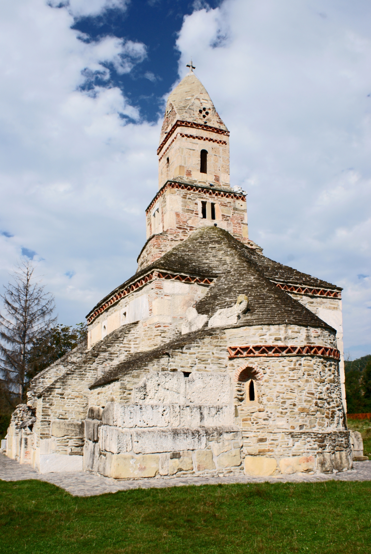 Demsus, ortodox templom